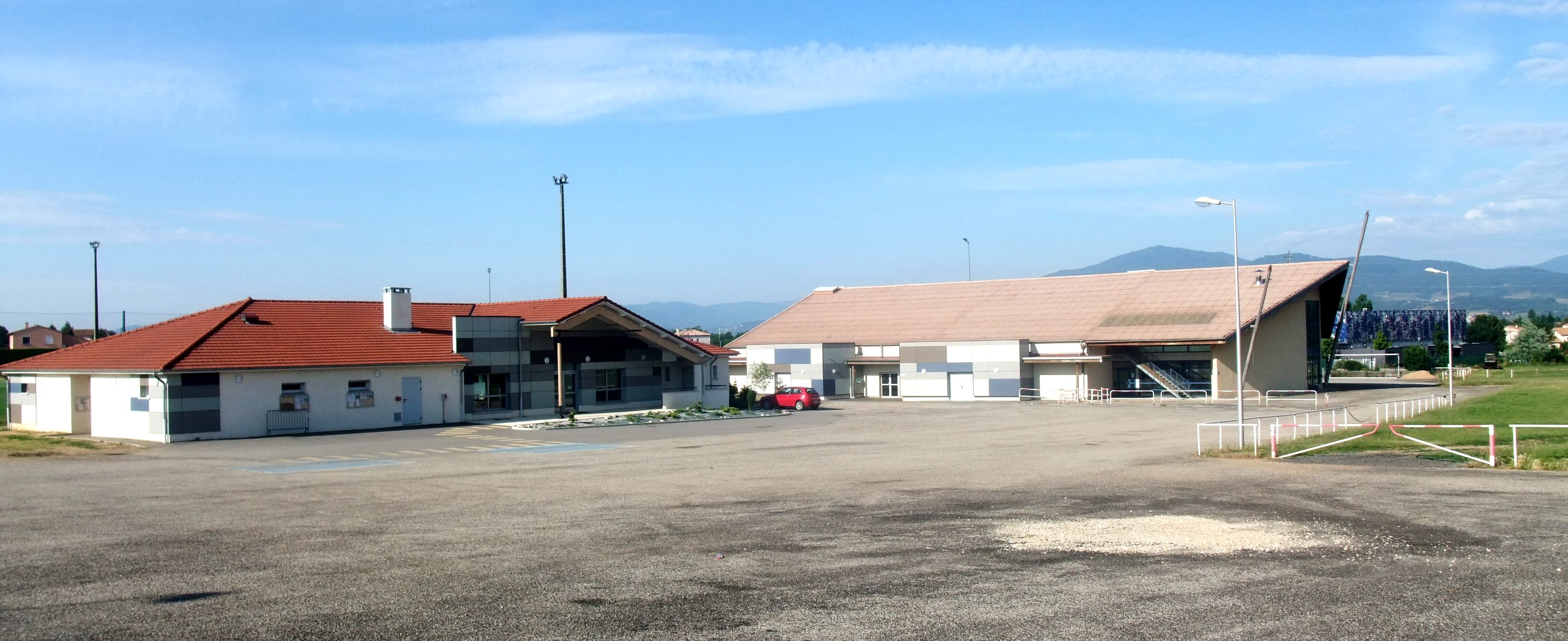 Davézieux Jossols panorama